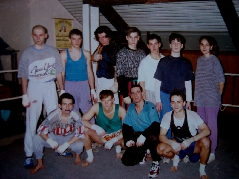 1 klub Muay Thai klub na Slovensku - GLADIATOR GYM Dubnica nad Váhom -Kvasnička,Dubovský,Vánik,Tomčanyi